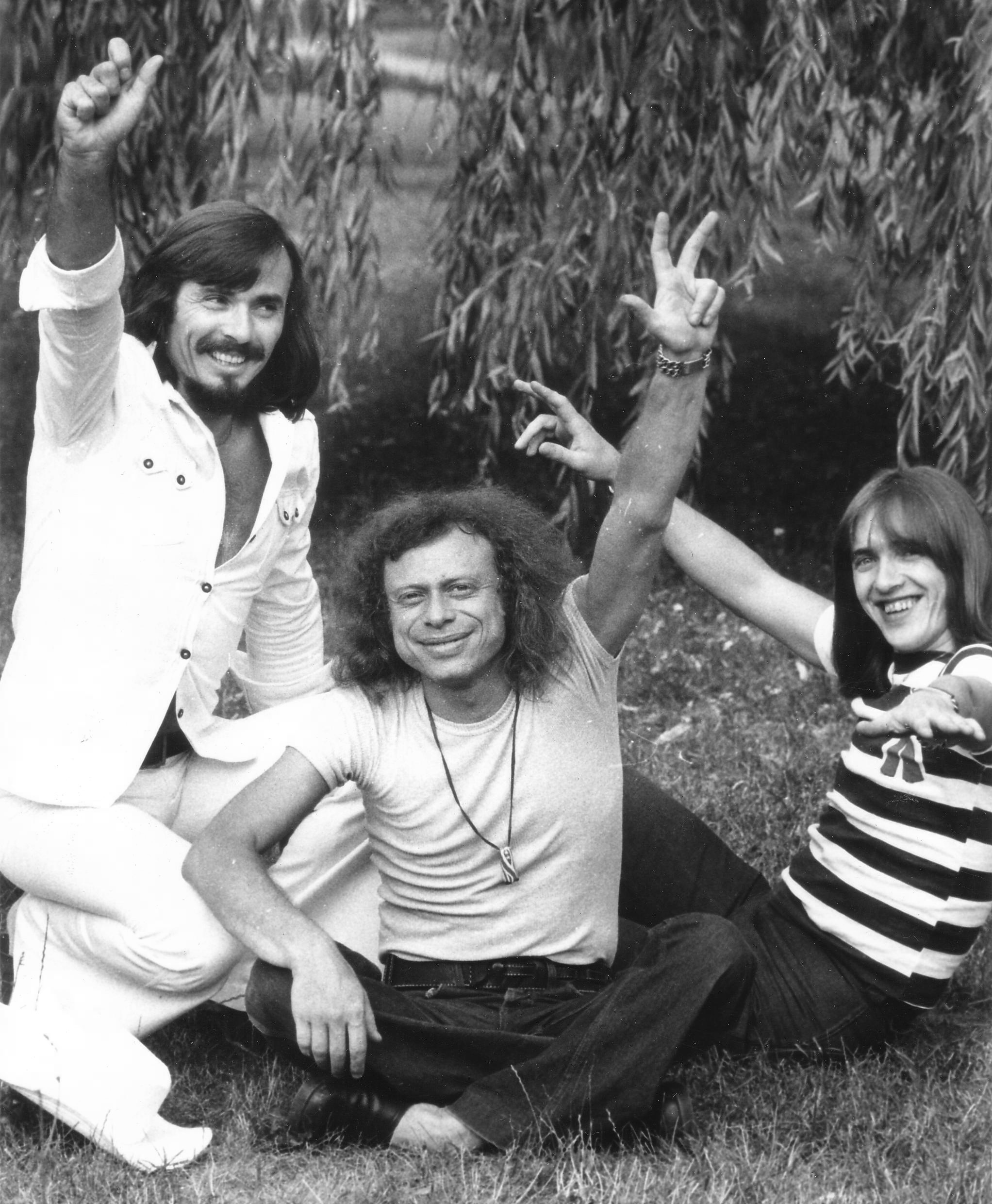 Grupa muzyczna Homo Homini (drugi skład), od lewej:Andrzej Krupiński, Aleksander Nowacki, Mirosław Peśla